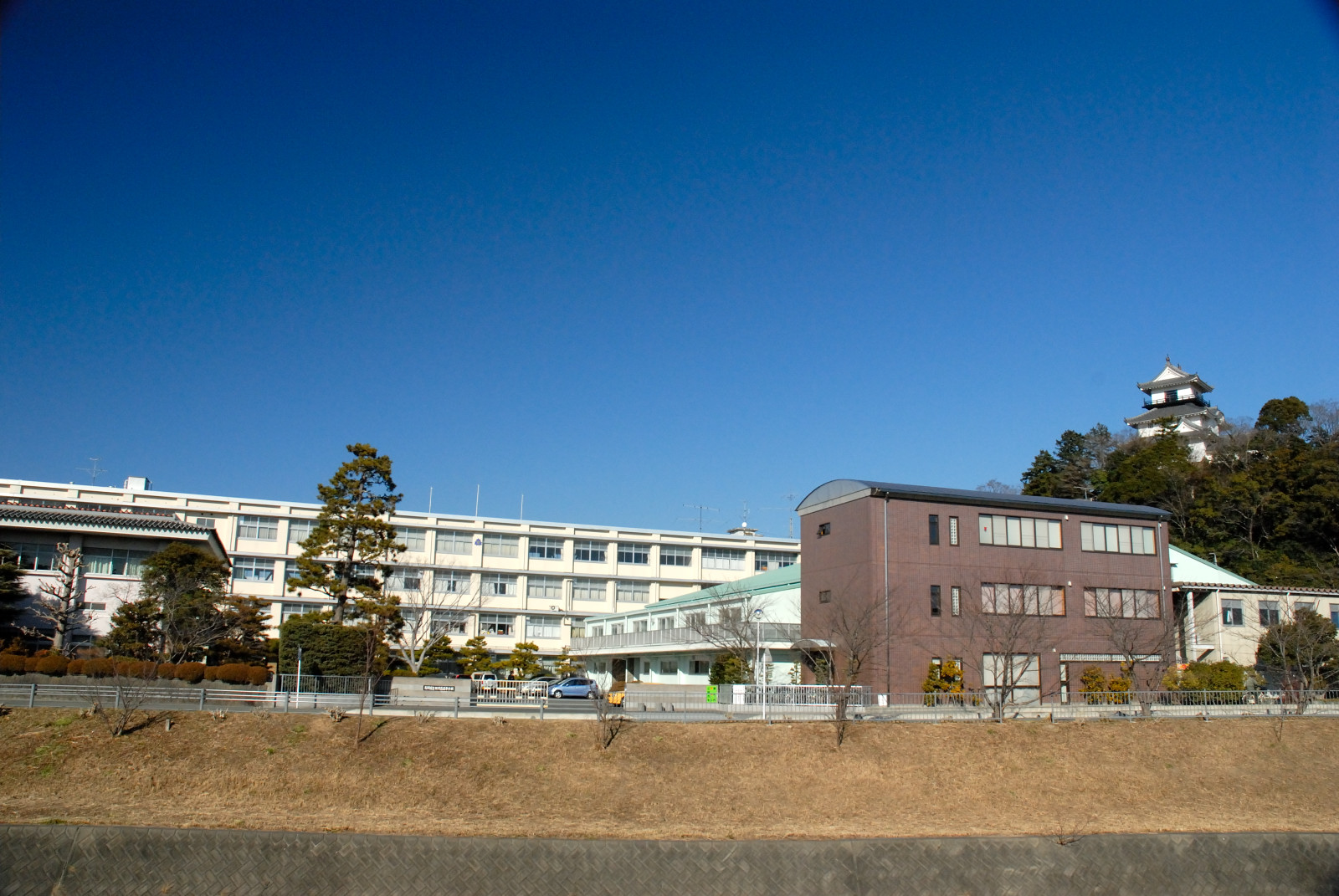 Kakegawa West High School, Shizuoka Japan.